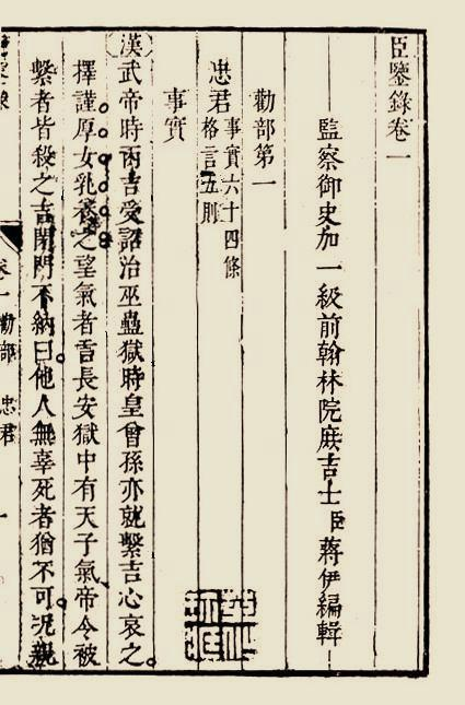 蔣伊《臣鑒錄》（Record of Mirror of Courtiers）卷一第一頁書影，康熙十四年（1675年）撰。